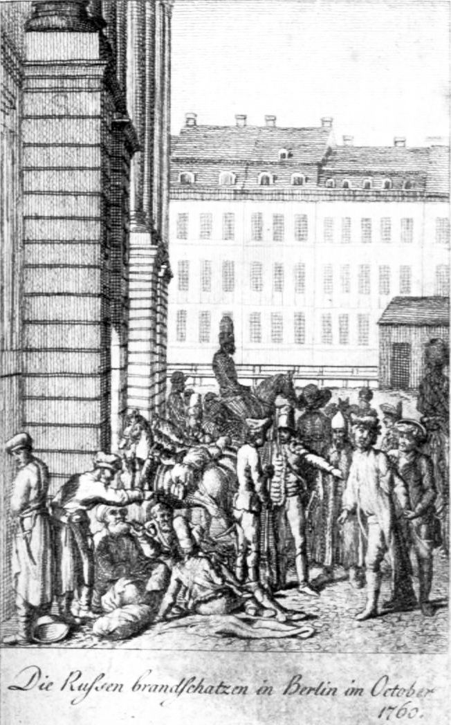 Berlin, Schloßplatz: Die Russen brandschatzen in Berlin im October 1760, Kupferstich von Daniel Chodowiecki, Illustration zu Die Geschichte des siebenjährigen Krieges in Deutschland von J. W. v. Archenholz